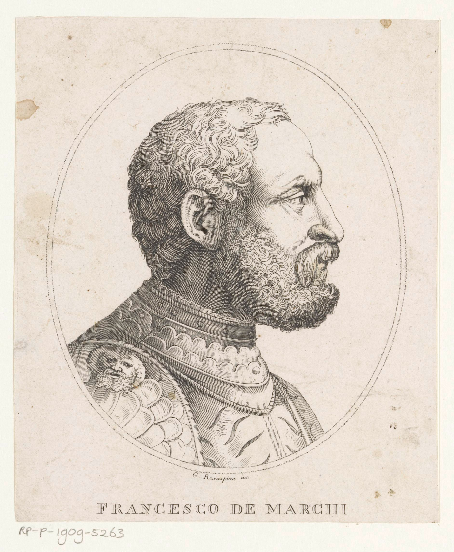 IdentificatieTitel(s): Portret van Francesco De MarchiObjecttype: prent Objectnummer: RP-P-1909-5263Opschriften / Merken: verzamelaarsmerk, verso, gestempeld: Lugt 2228VervaardigingVervaardiger: prentmaker: Giuseppe Rosaspina (vermeld op object)Plaats vervaardiging: ItaliëDatering: 1775 - 1832Fysieke kenmerken: gravure en etsMateriaal: papier Techniek: graveren (drukprocedé) / etsenAfmetingen: blad: h 167 mm (Binnen plaatrand afgesneden.) × b 140 mm (Binnen plaatrand afgesneden.)OnderwerpWat: historical personsWie: Francesco de MarchiVerwerving en rechtenVerwerving: aankoop 1905Copyright: Publiek domein